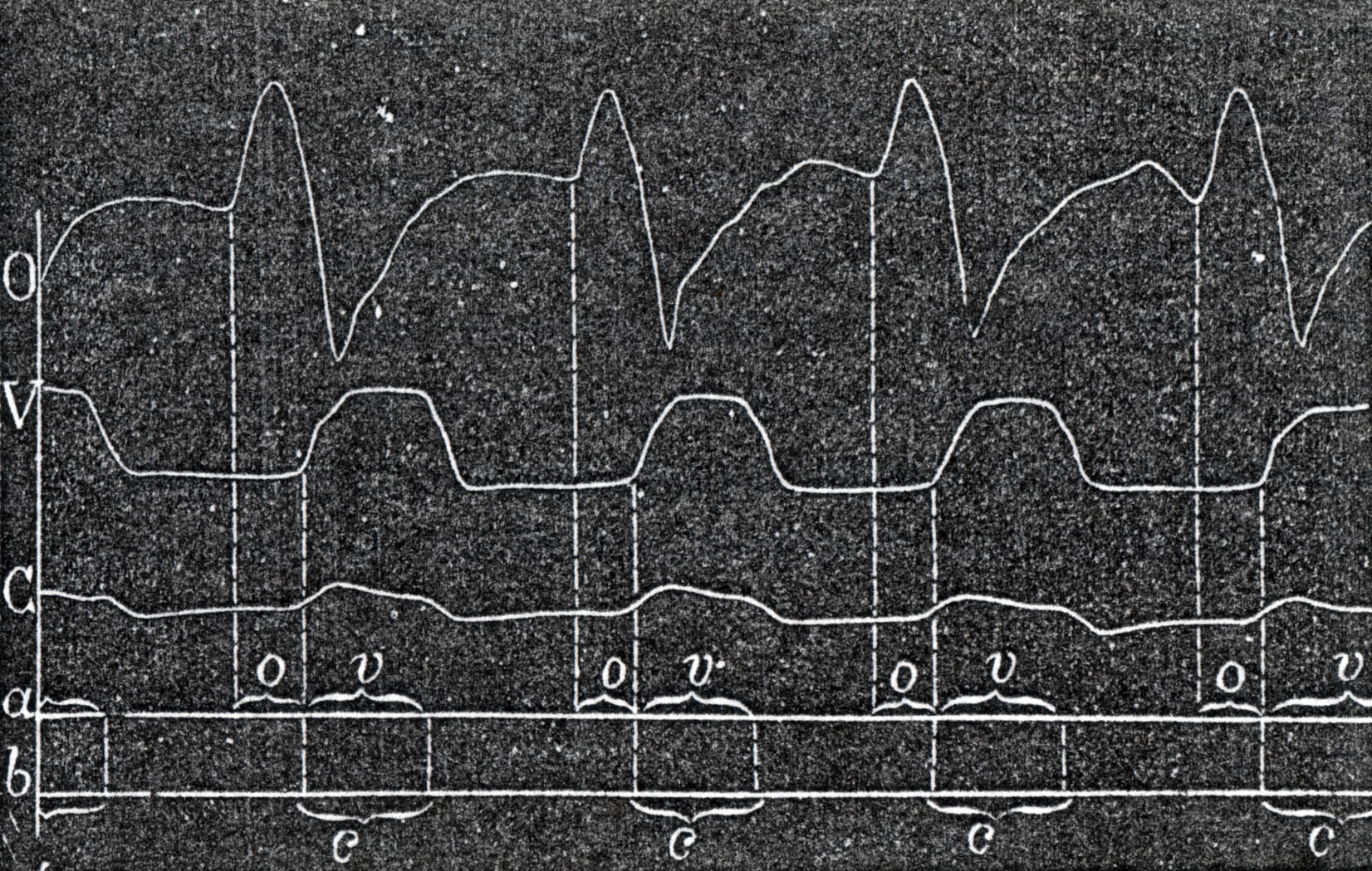 Intrakardial sphygmographisch gewonnene Pulsdruckkurven mit chronologischer Zuordnung der Herzaktionsphasen (O=Vorhofdruck, V=Ventrikeldruck, C=kardiale Pulskurve)